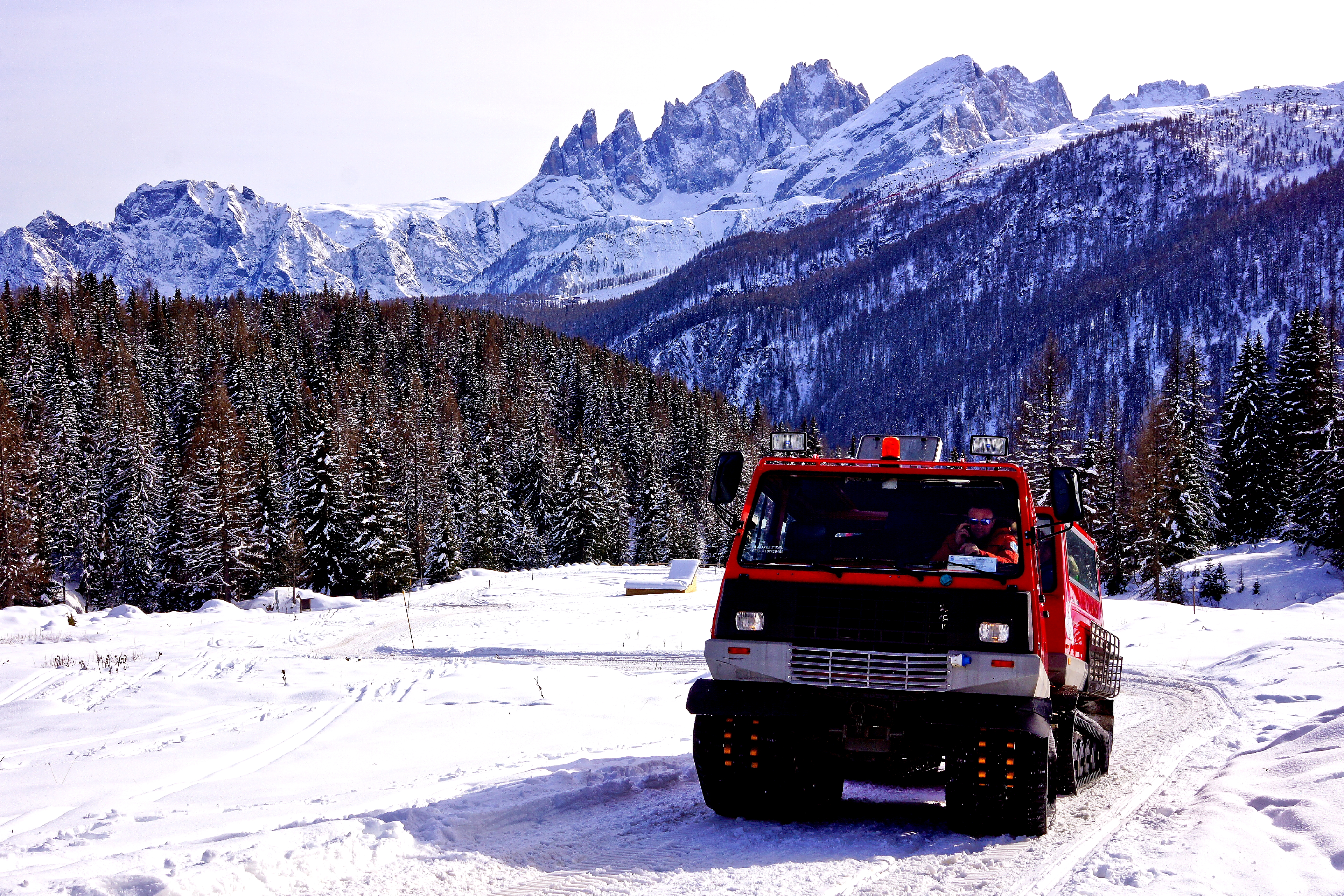 La navetta di Fuchiade